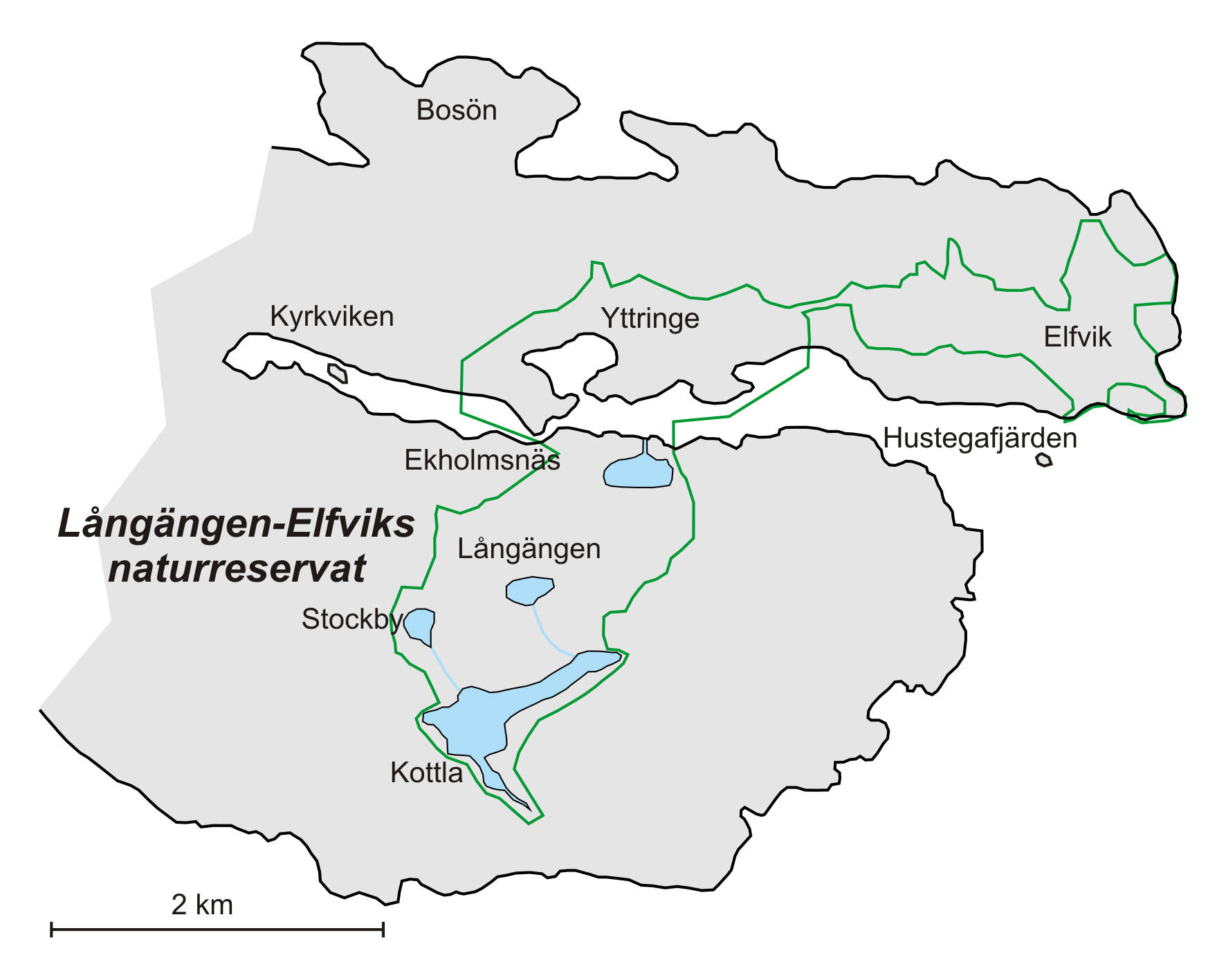 Karta över Långängen-Elfviks naturreservat på Lidingö.